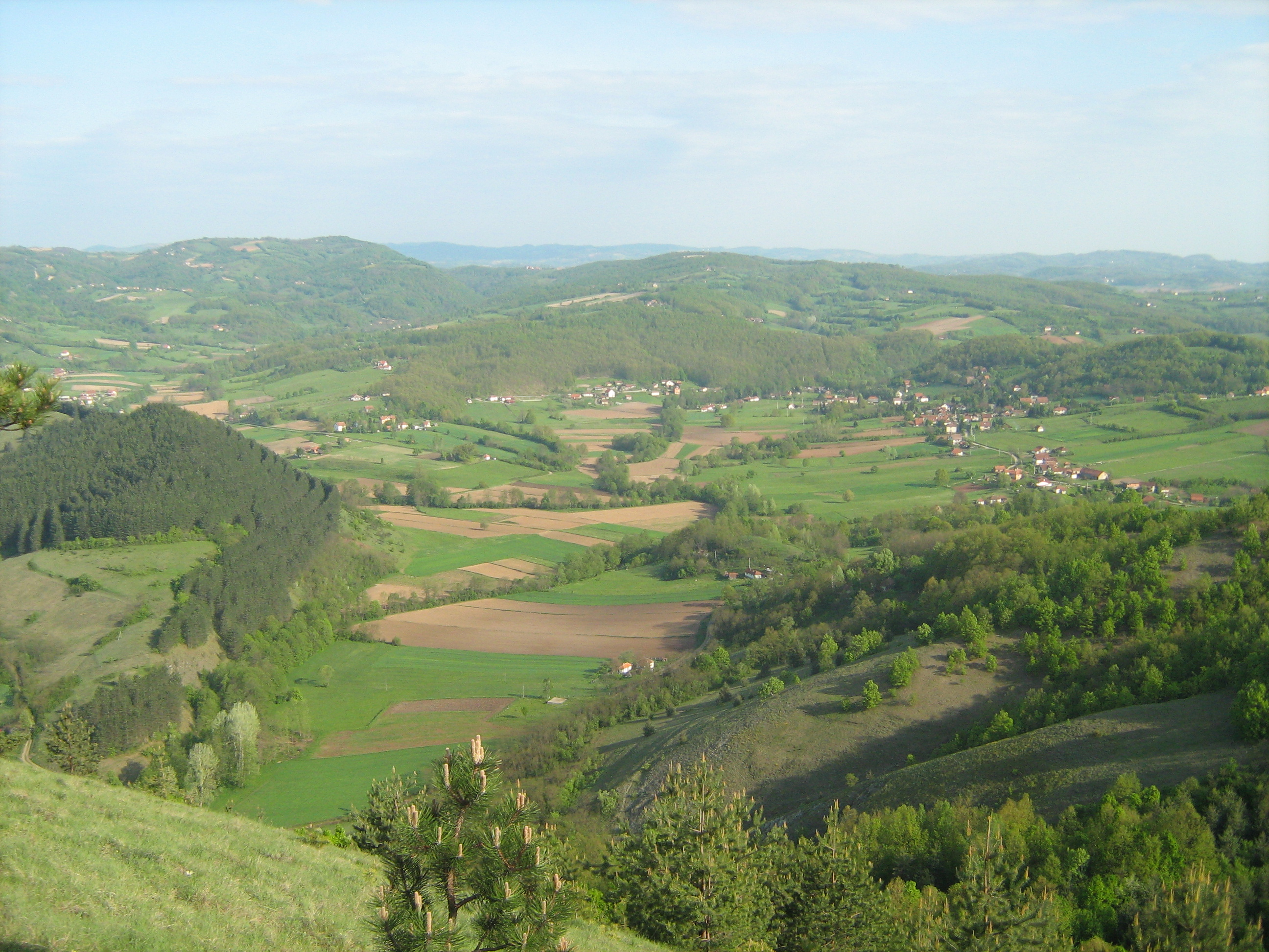 Аутор:Михаило Јовановић; Сликано са брда Крвавац 1. маја 2008. године. Фотоапарат: Канон А460